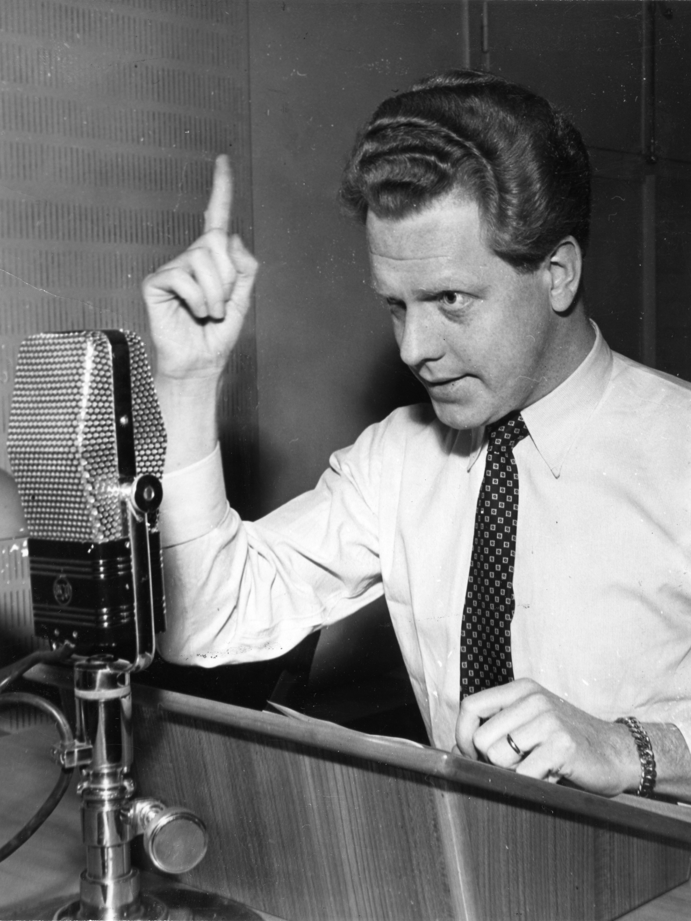 Tage Danielsson i sin radioserie Till Andersson i Nedan som sändes i Sveriges Radio 1954-55.